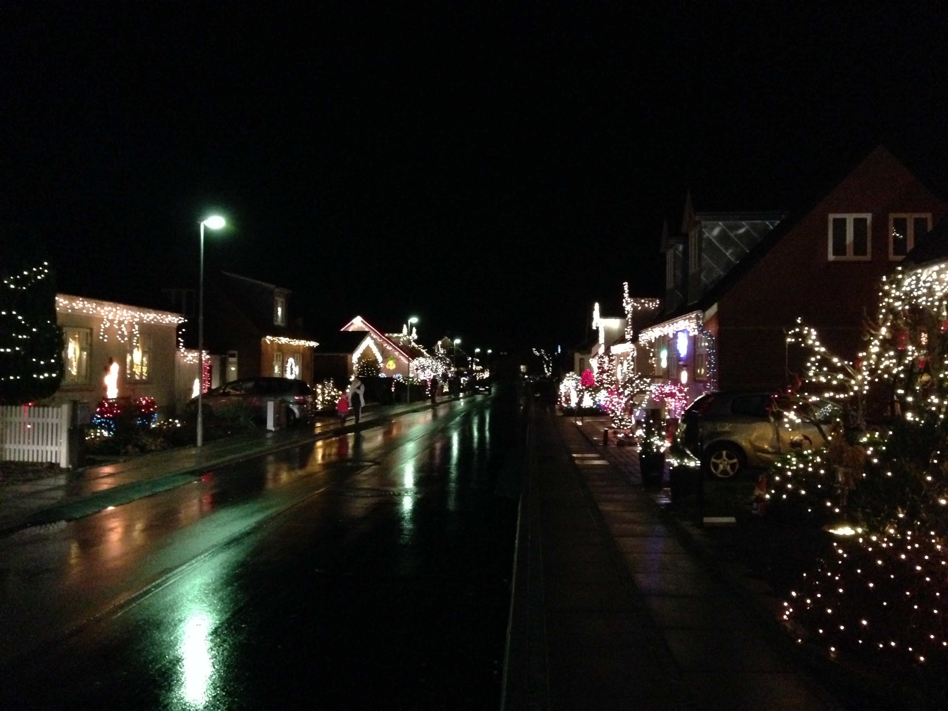 Julebelysning d. 22. december 2013.